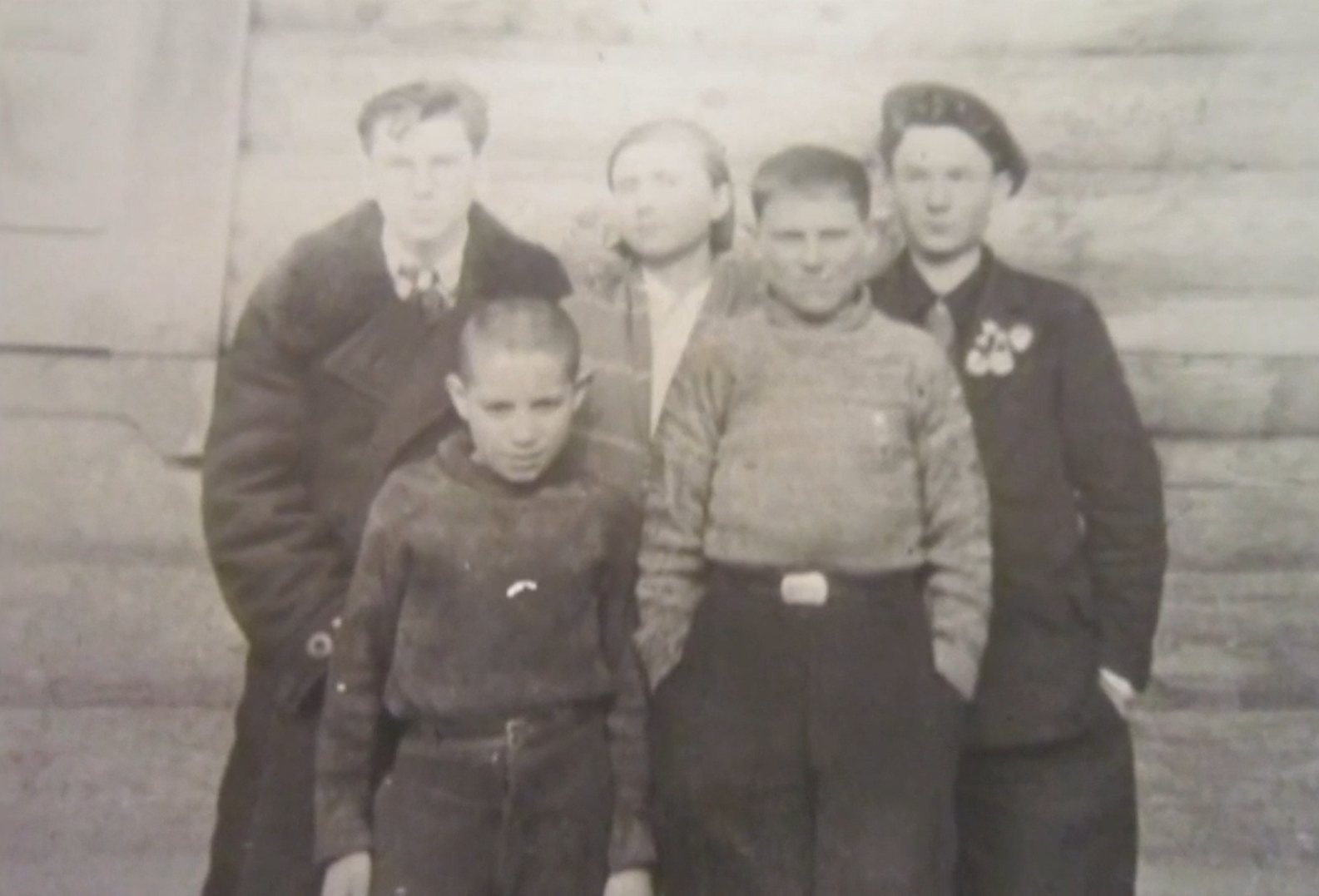 Шолохович, Уборевич, Мосин